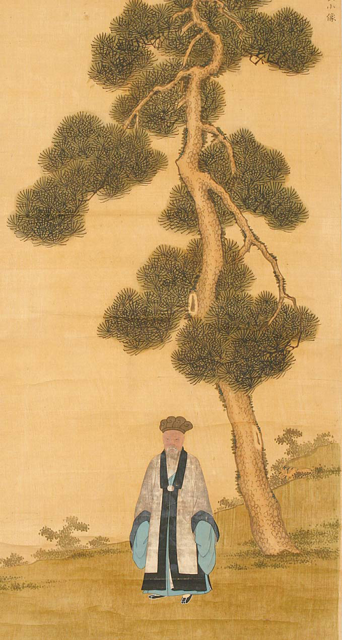 송하한유도